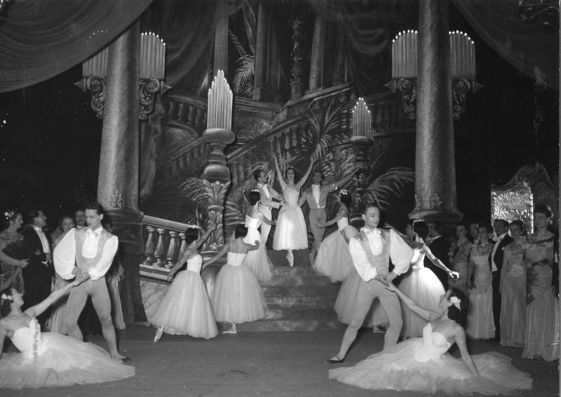 "Die Fledermaus" Düsseldorfer Opernhaus (Tanzeinlage mit Edel von Rothe)